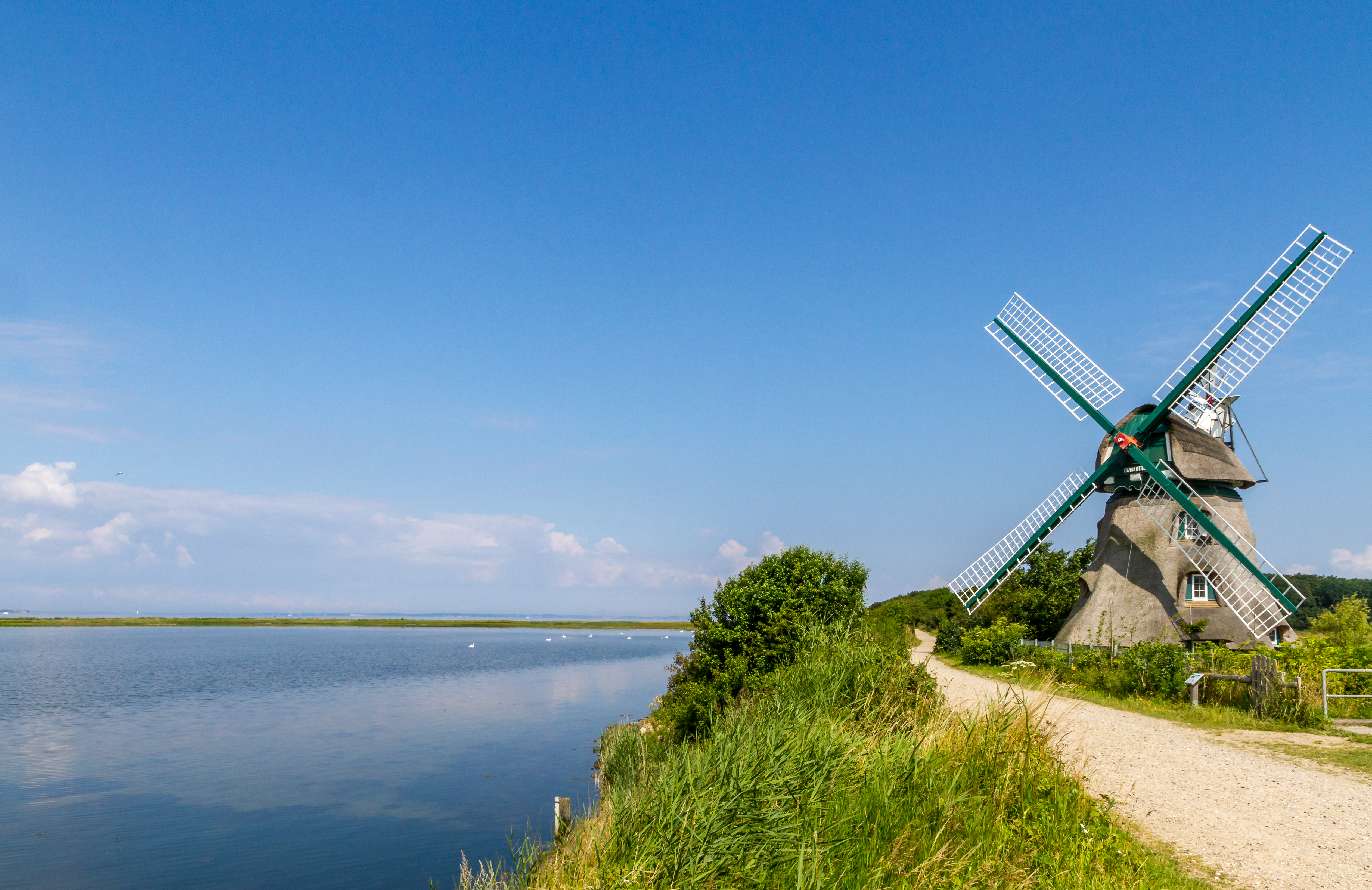 Die Windmühle Charlotte